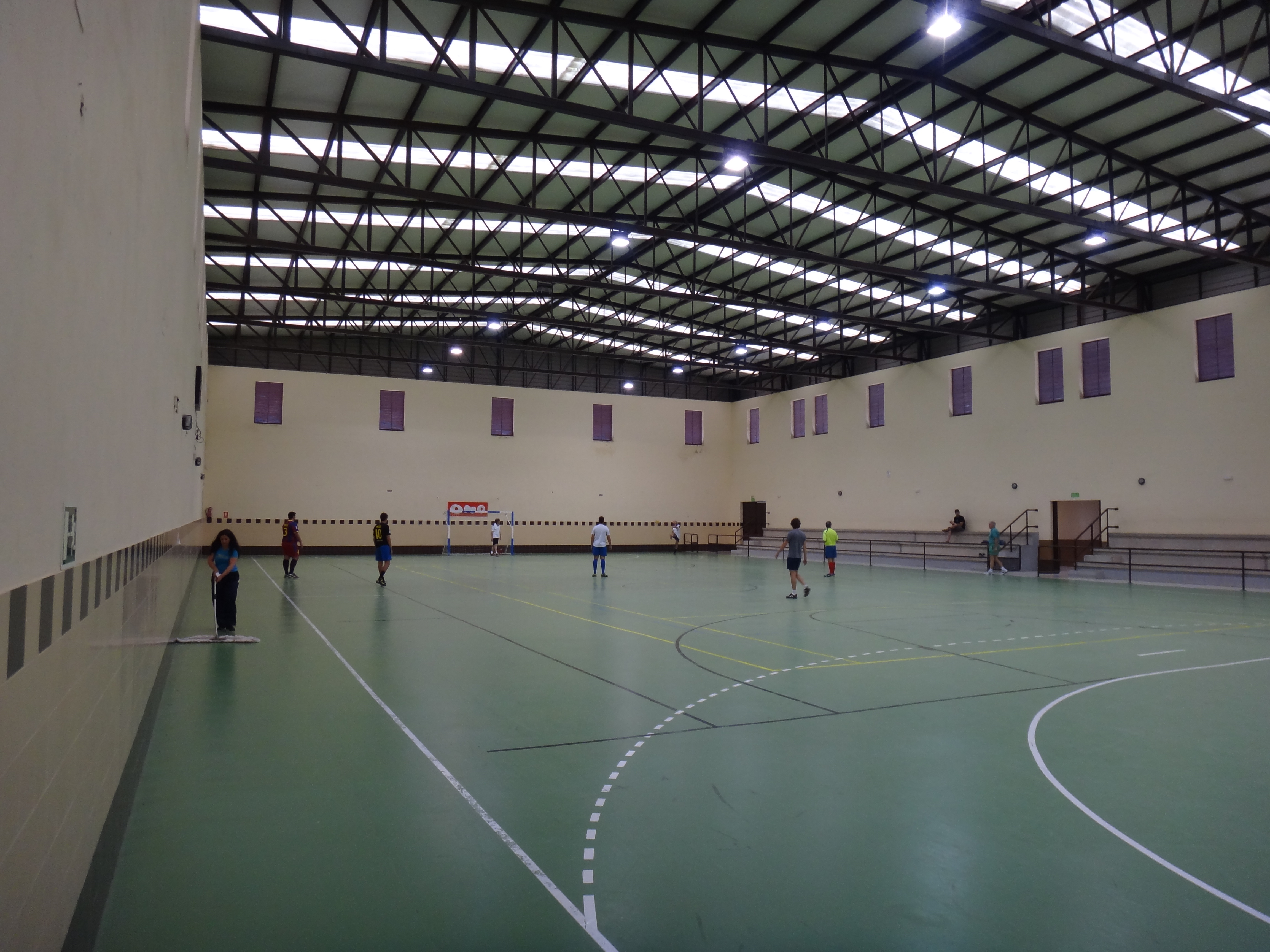 Interior del polideportivo del Campo de la Juventud en Jerez Fra (Andalucía, España)